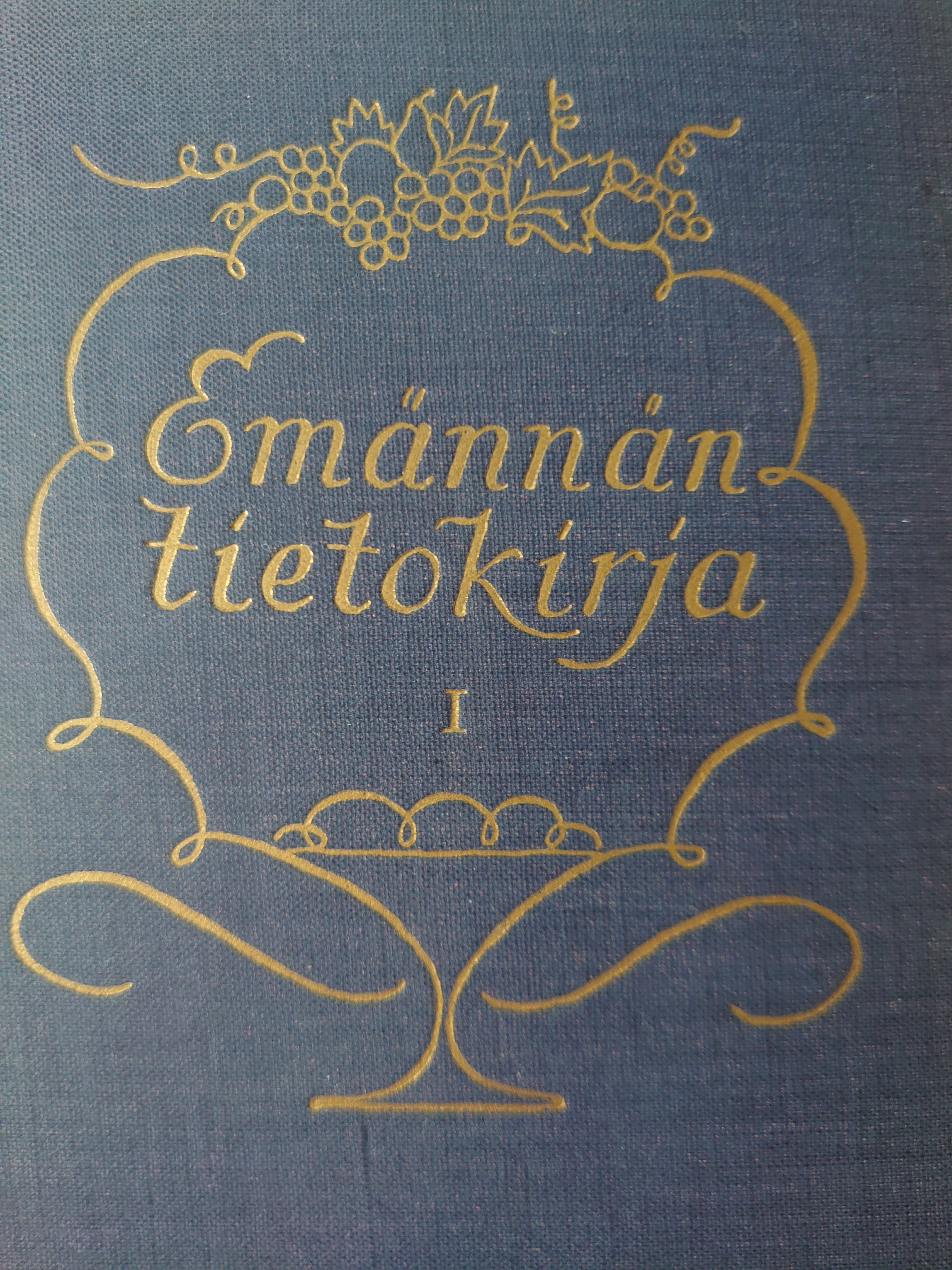 Emännän tietokirja, 3. painos, WSOY 1932